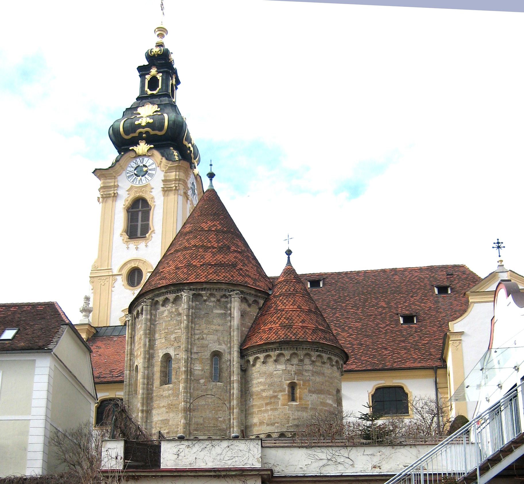 Hartberg, der romanische Karner vor der Pfarrkirche